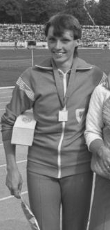 Erfurt, Weltrekord über 4 x 100 m der Frauen ADN-ZB-Kluge- 2.6.84 - Erfurt: 35. DDR-Meisterschaften in der Leichtathletik/Weltrekord/ Einen Weltrekord für Klubsatffeln stellten über 4 x 100 m Bärbel Wöckel, Marlies Göhr, Ingrid Auerswald und Ines Schmidt [- Geipel] vom SC Motor Jena in 42,20 s auf. Abgebildete Personen: Wöckel, Bärbel: Leichtathletin, Läuferin, SC Motor Jena, Olympiateilnehmerin 1976 und 1980, Vaterländischer Verdienstorden (VVO) in Gold 1950, DDR